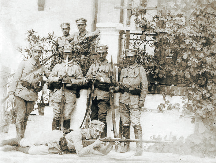 Ułańska siódemka na ganku w Goszycach. Leży: Stefan Kulesza "Hanka" od lewej: pierwszy szereg: Zygmunt Karwacki "Bończa", Stanisław Skotnicki "Grzmot", Janusz Głuchowski "Janusz", Antoni Jabłoński "Zdzisław" drugi szereg: Ludwik Skrzyński "Kmicic", Władysław Prażmowski "Belina".